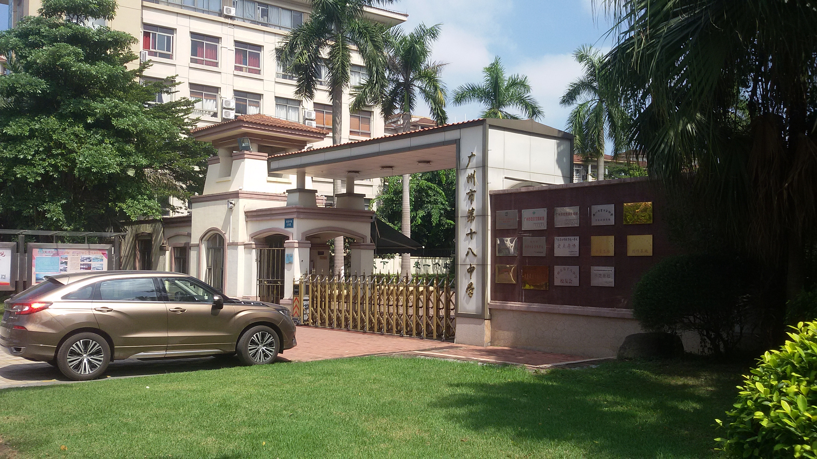 粵語: 广州市第18中学嘅正门